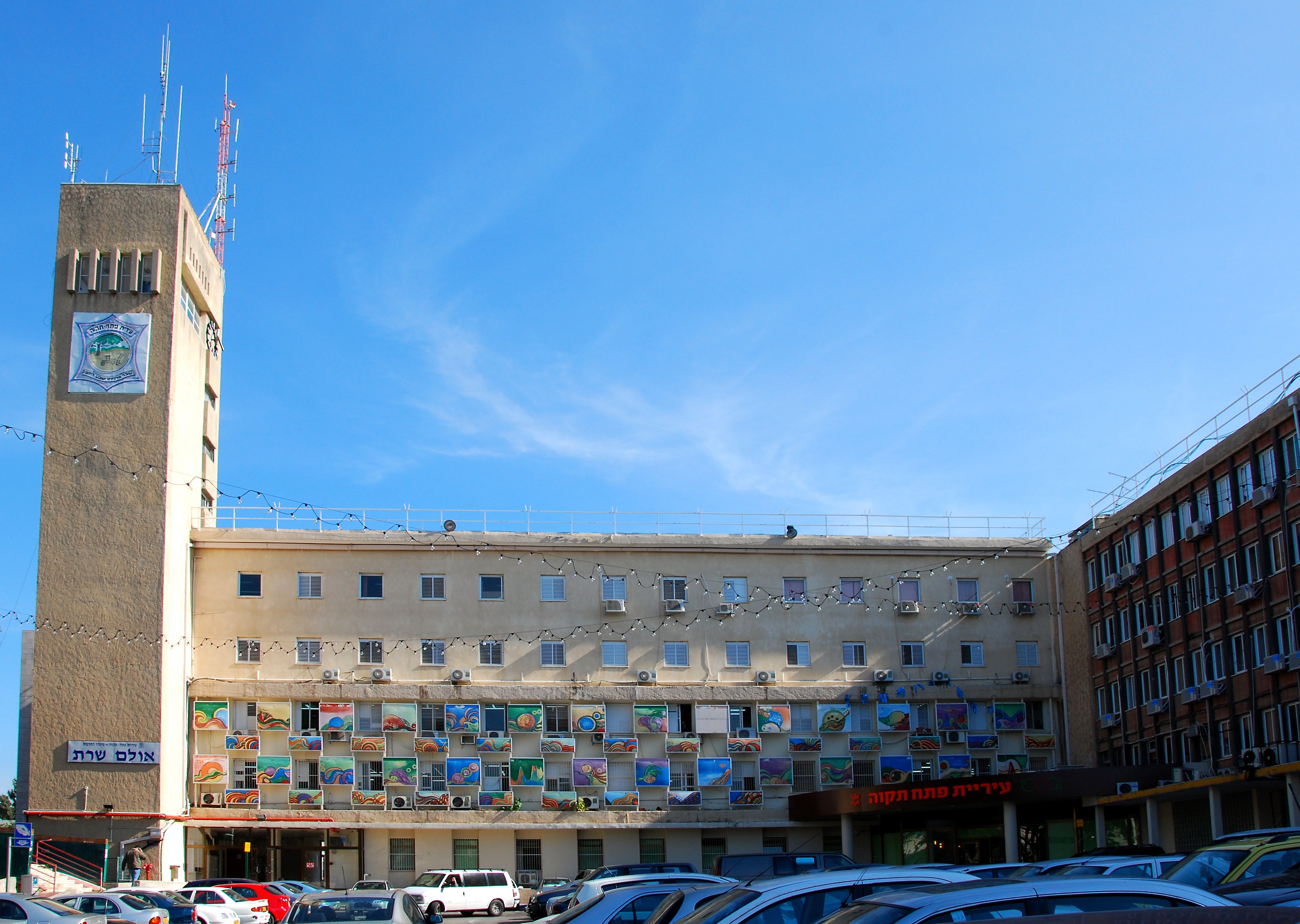 Petah Tikva, Israel municipality building.